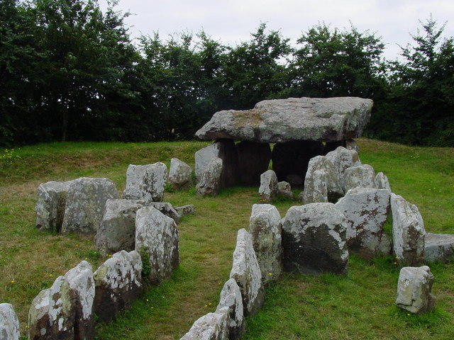 Dolmen de Faldouet Burial Chamber, Gorey.